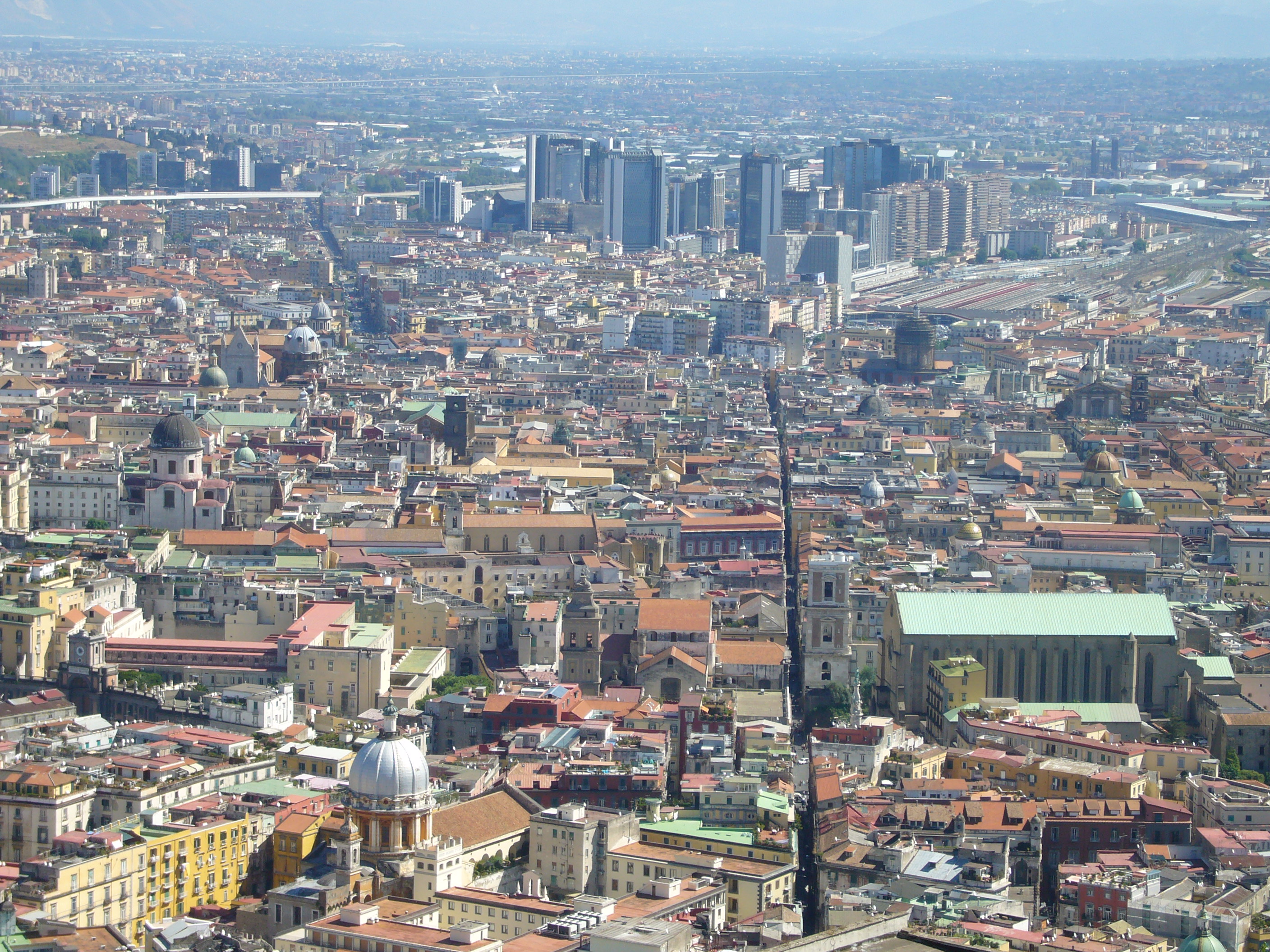 Napoli, panorama da Sant'Elmo: Spaccanapoli, Santa Chiara, Centro direzionale ecc.ecc.